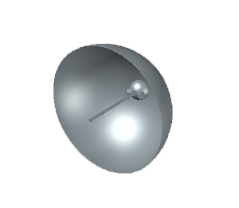 Vista interna della parte superiore della lampada Atollo